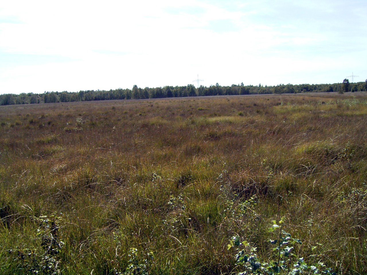 Torfmoos-Schwingrasen auf verlandetem Hochmoorkolk, Norddeutschland